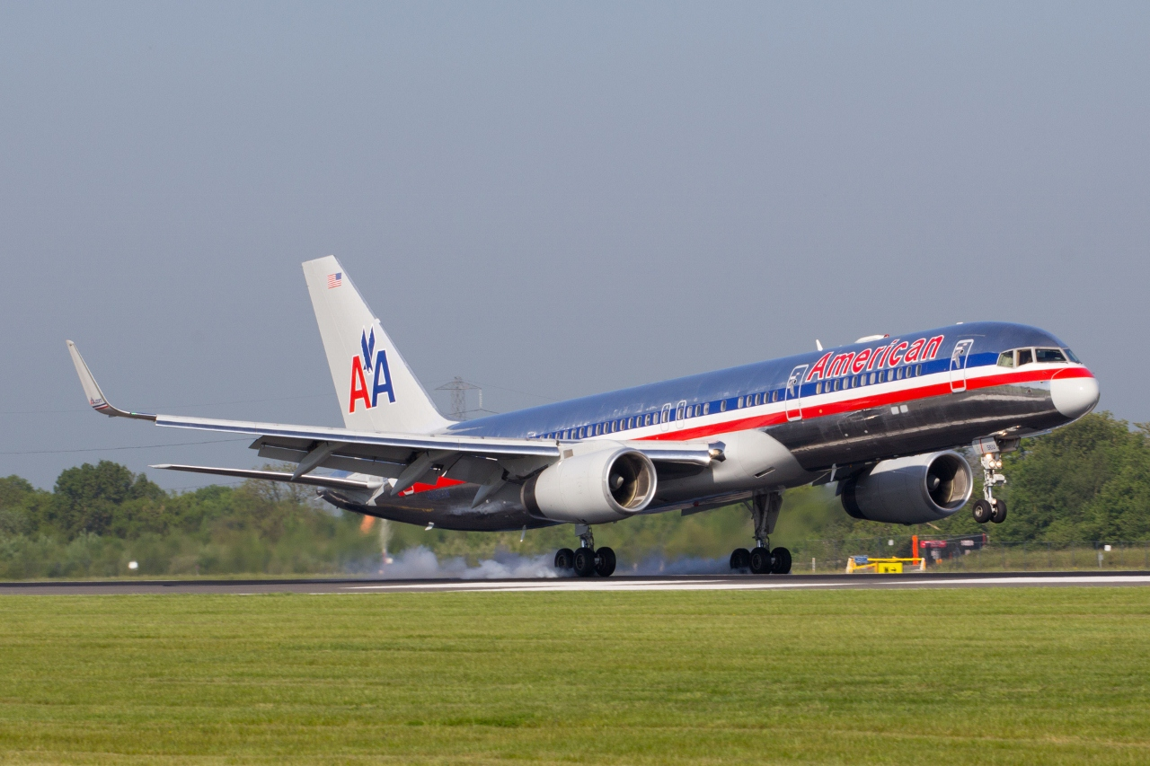 Manchester 25/5/12